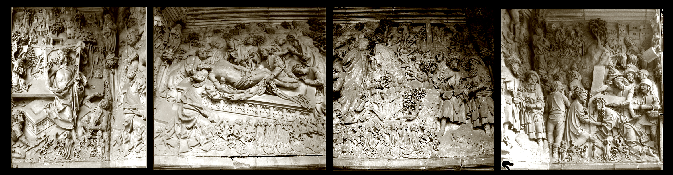 Адам_Крафт._Эпитафия_Ландауэров. Фрагменты